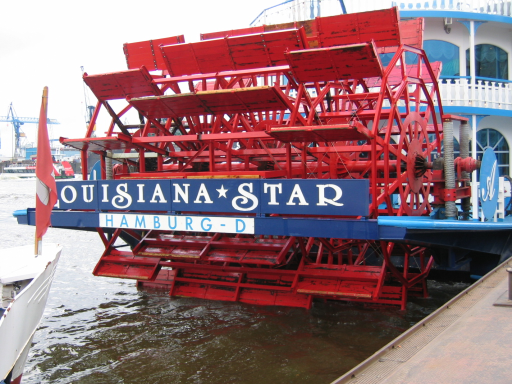 Koło łopatkowe tylnokołowca "Louisiana Star" odbywającego rejsy wycieczkowe po porcie w Hamburgu